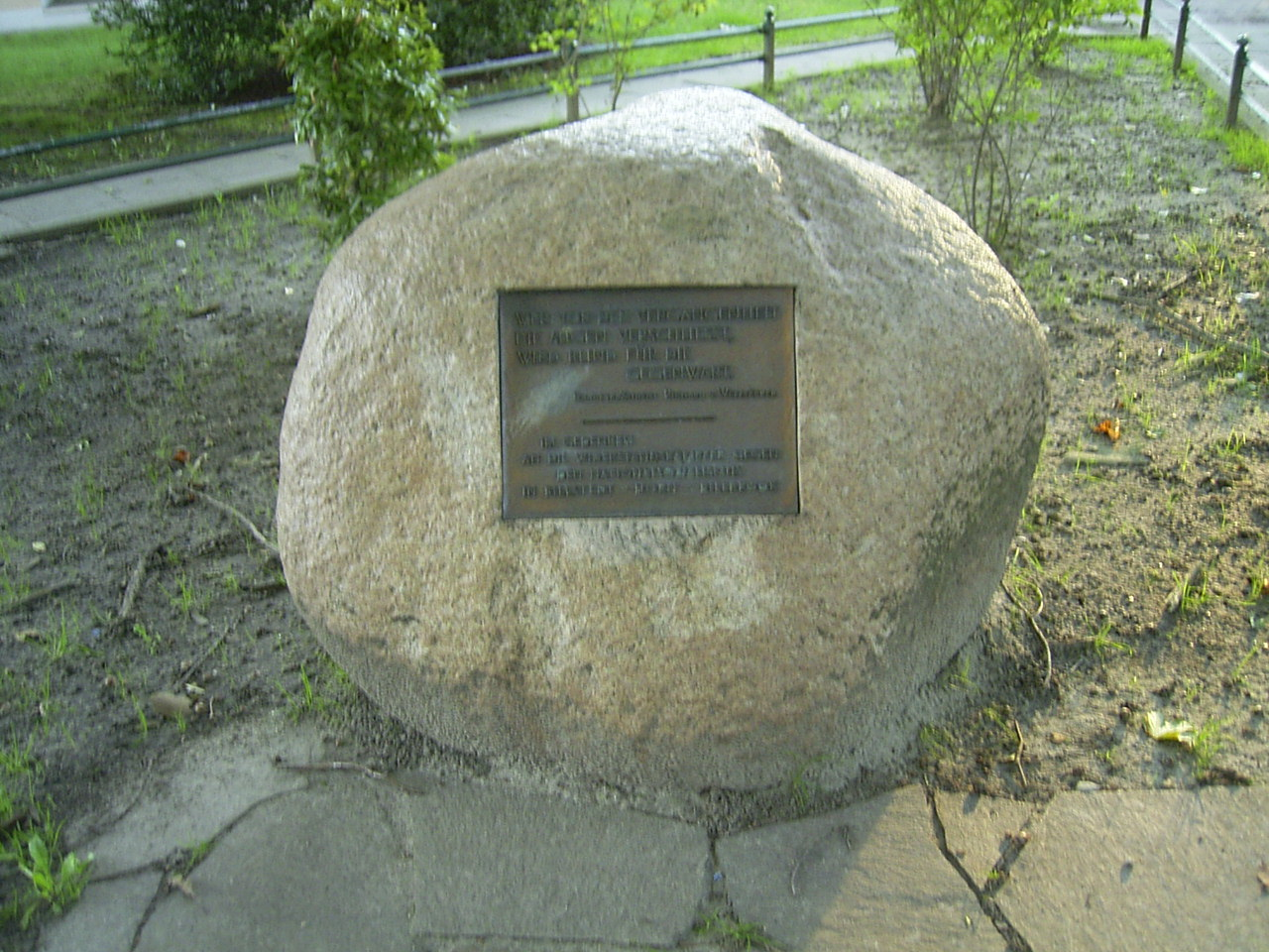 Gedenkstein für Widerstandskämpfer in Billstedt mit dem Text: "Wer vor der Vergangenheit die Augen verschließt, wird blind für die Gegenwart" (Richard v. Weizsäcker, Bundespräsident) - Im Gedenken an die Widerstandskämpfer in Billstedt - Horn - Billbrook.